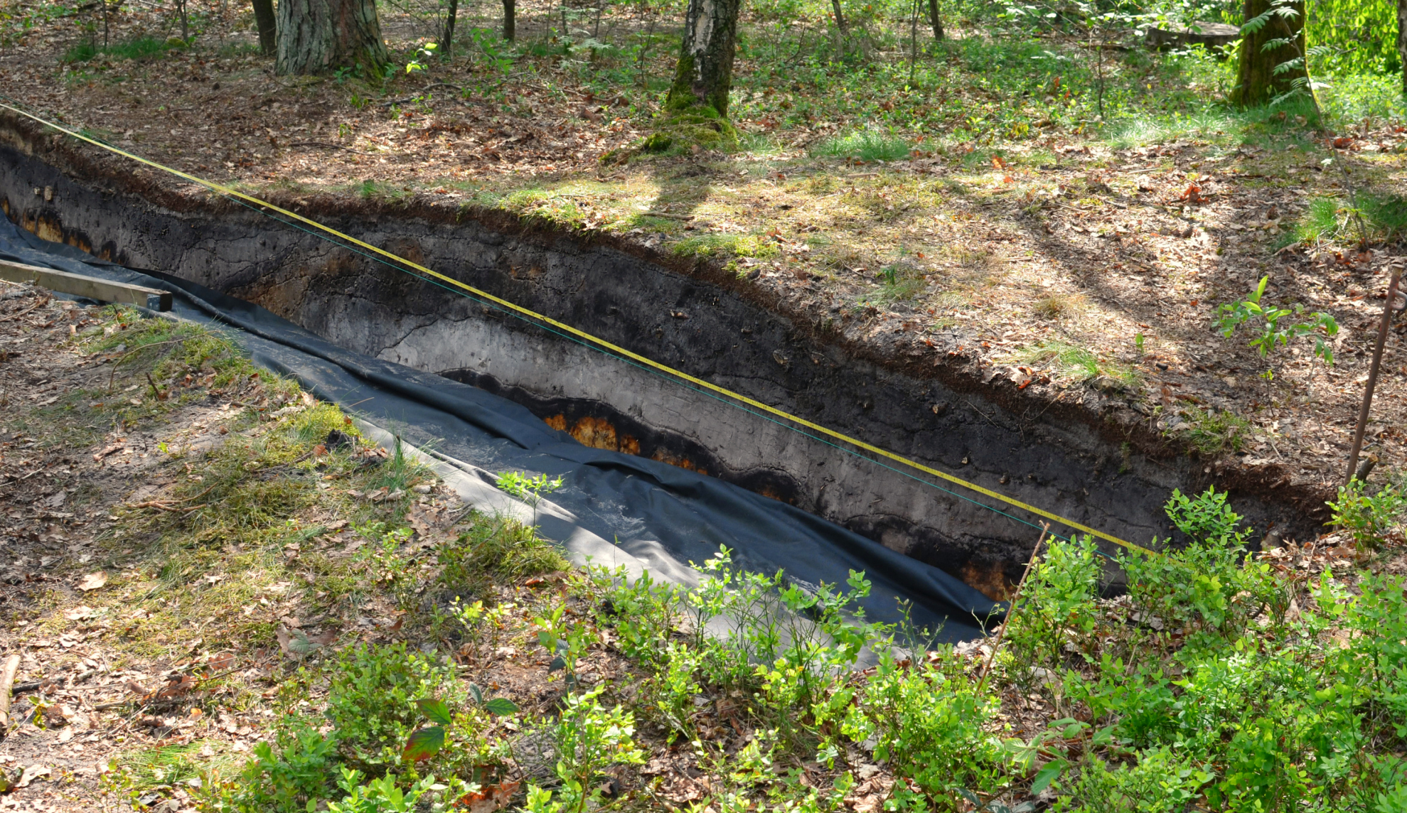 Ausgrabungschnitt im Wall des Römerlagers Bielefeld Gegenlicht, das den Wall hervor hebt